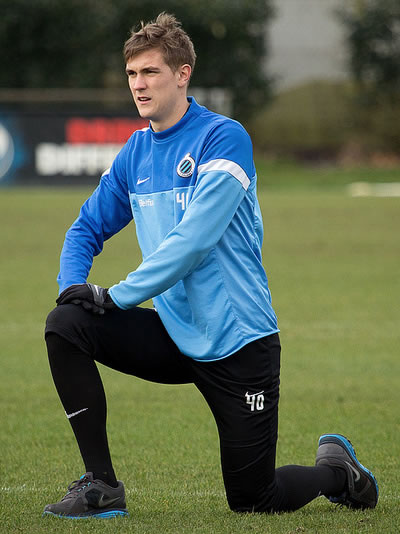 Björn Engels, speler van Club Brugge